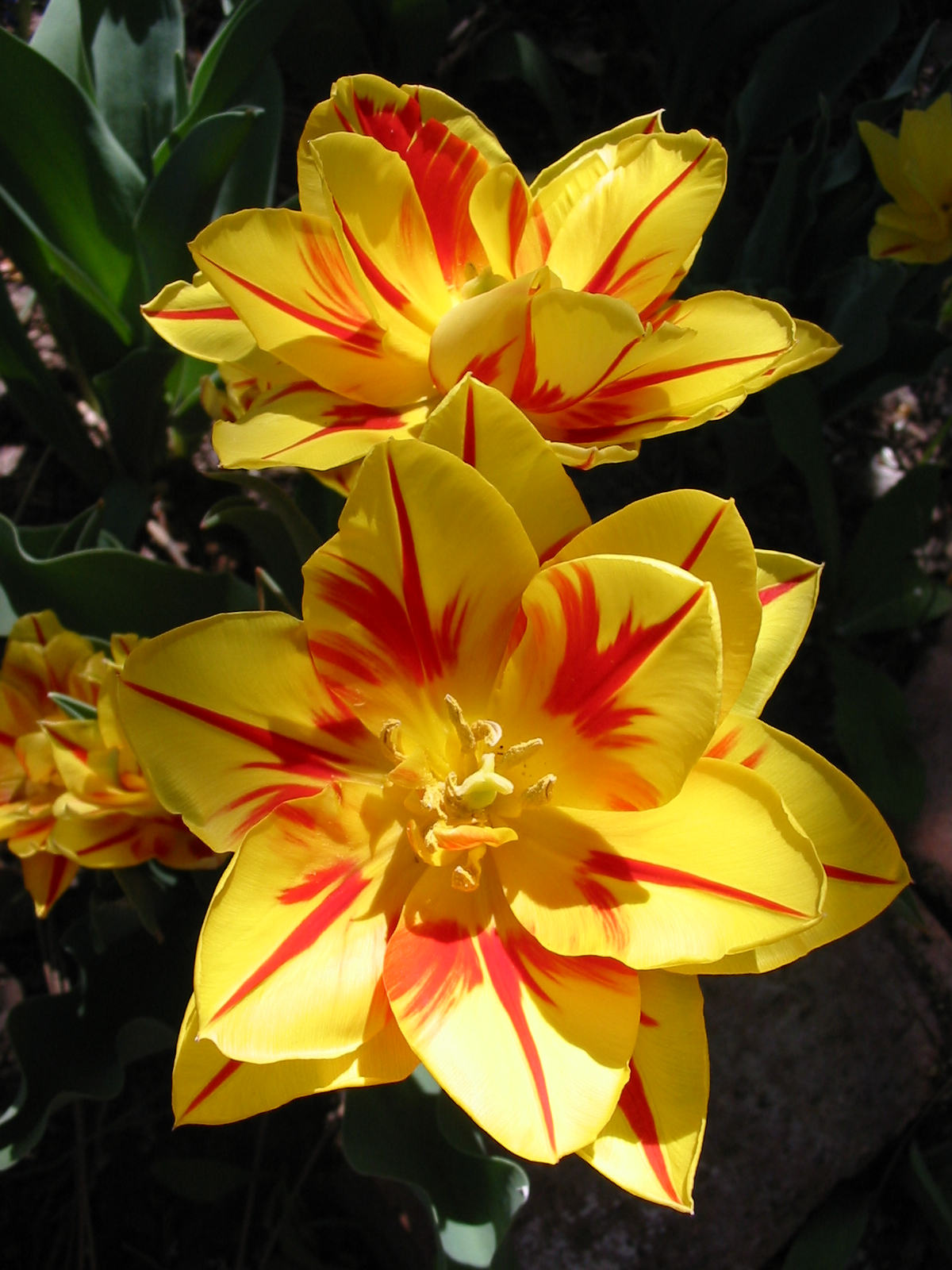 Double Late Tulip 'Monsella'